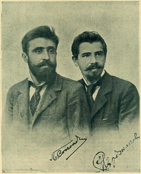 Петър Соколов и Светослав Мерджанов.